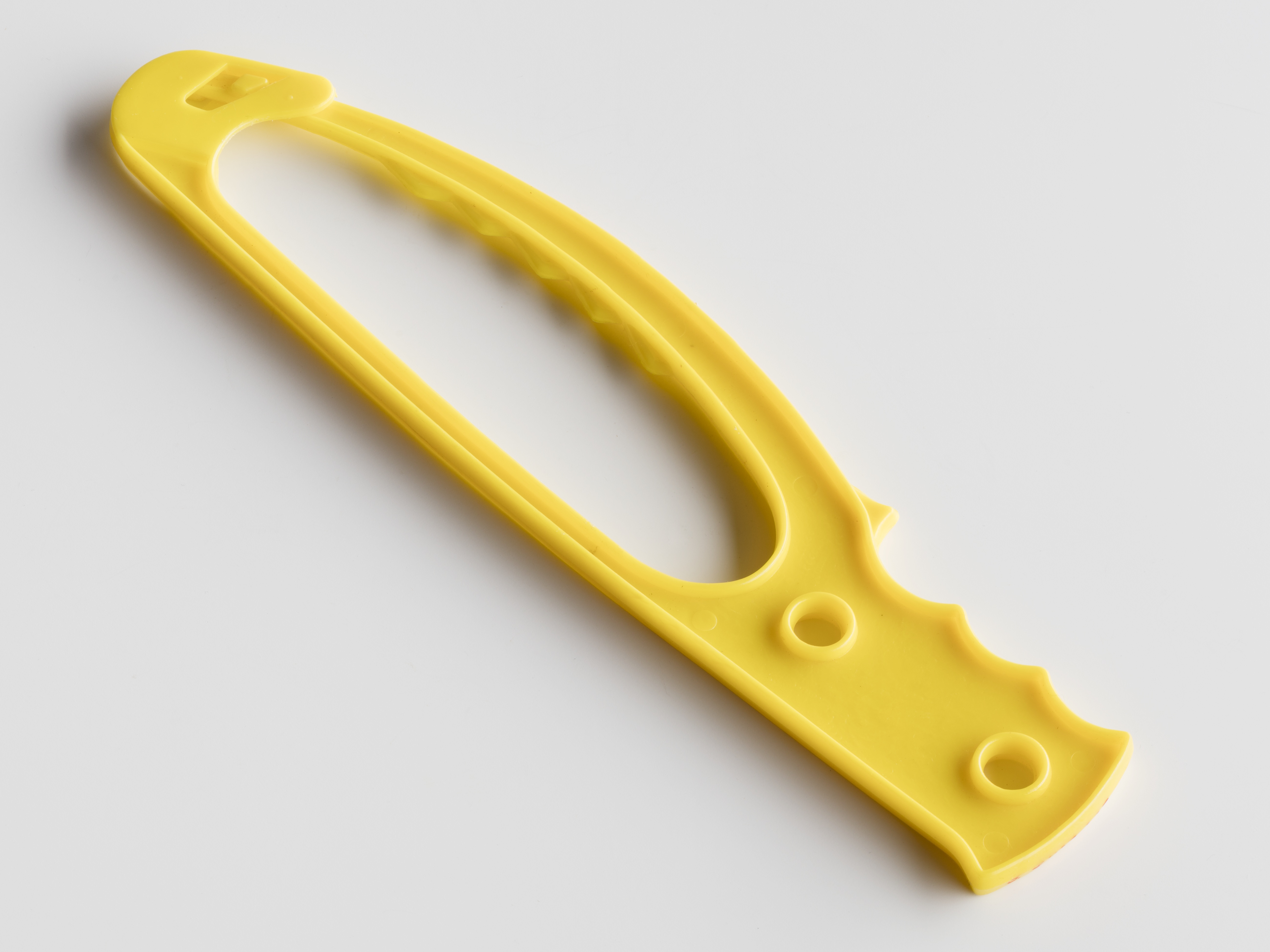 Puikkari on kalastuksessa käytetty kädensijallinen puikko, jolle kalaverkko kootaan ja jolta se lasketaan.